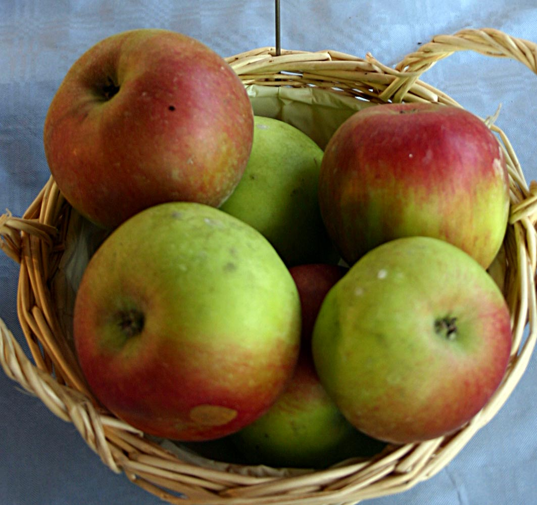 Malus "Idared", Büdingen